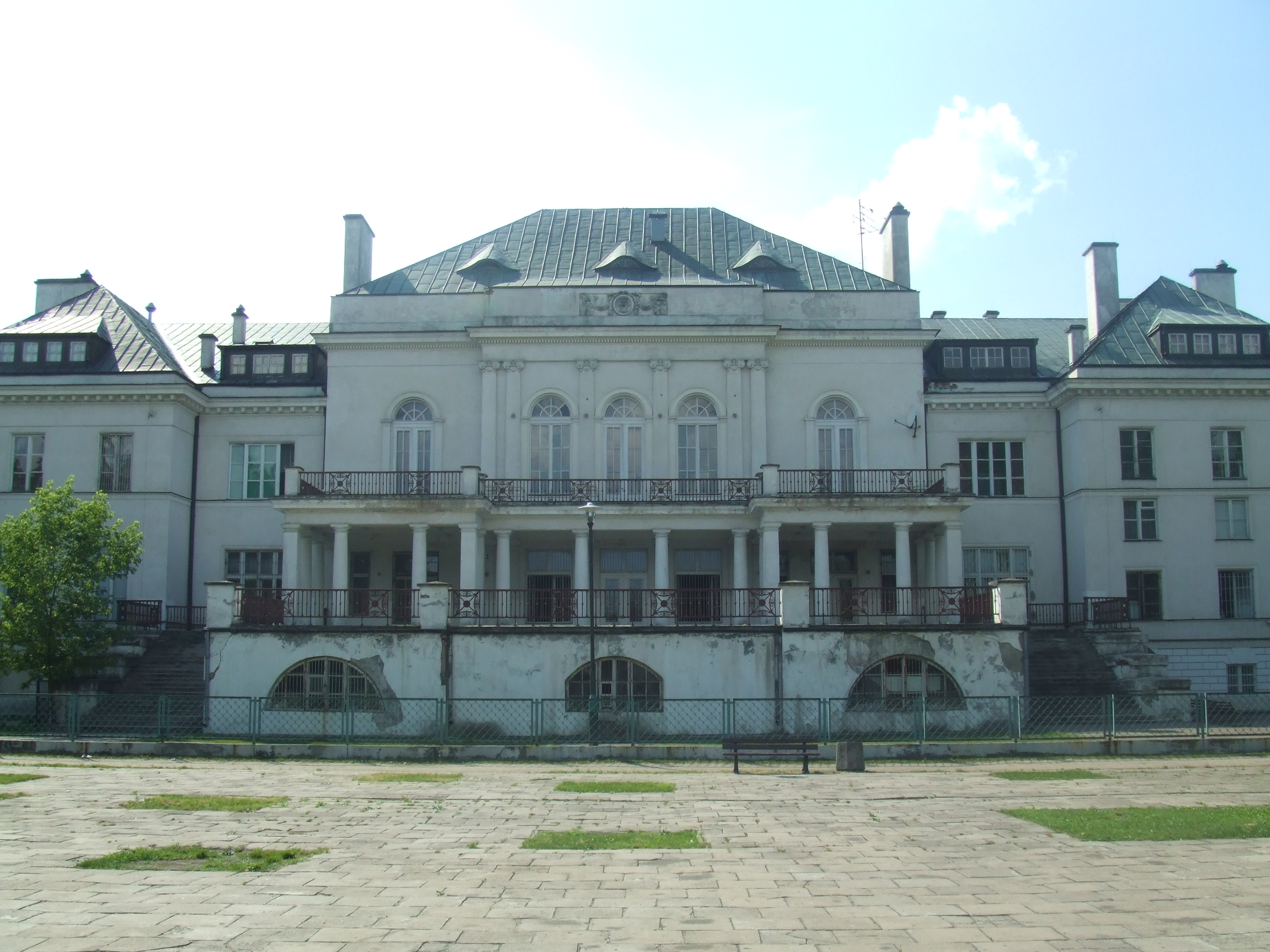 Otwock - Liceum im. K. I. Gałczyńskiego (zdjęcie z tyłu)